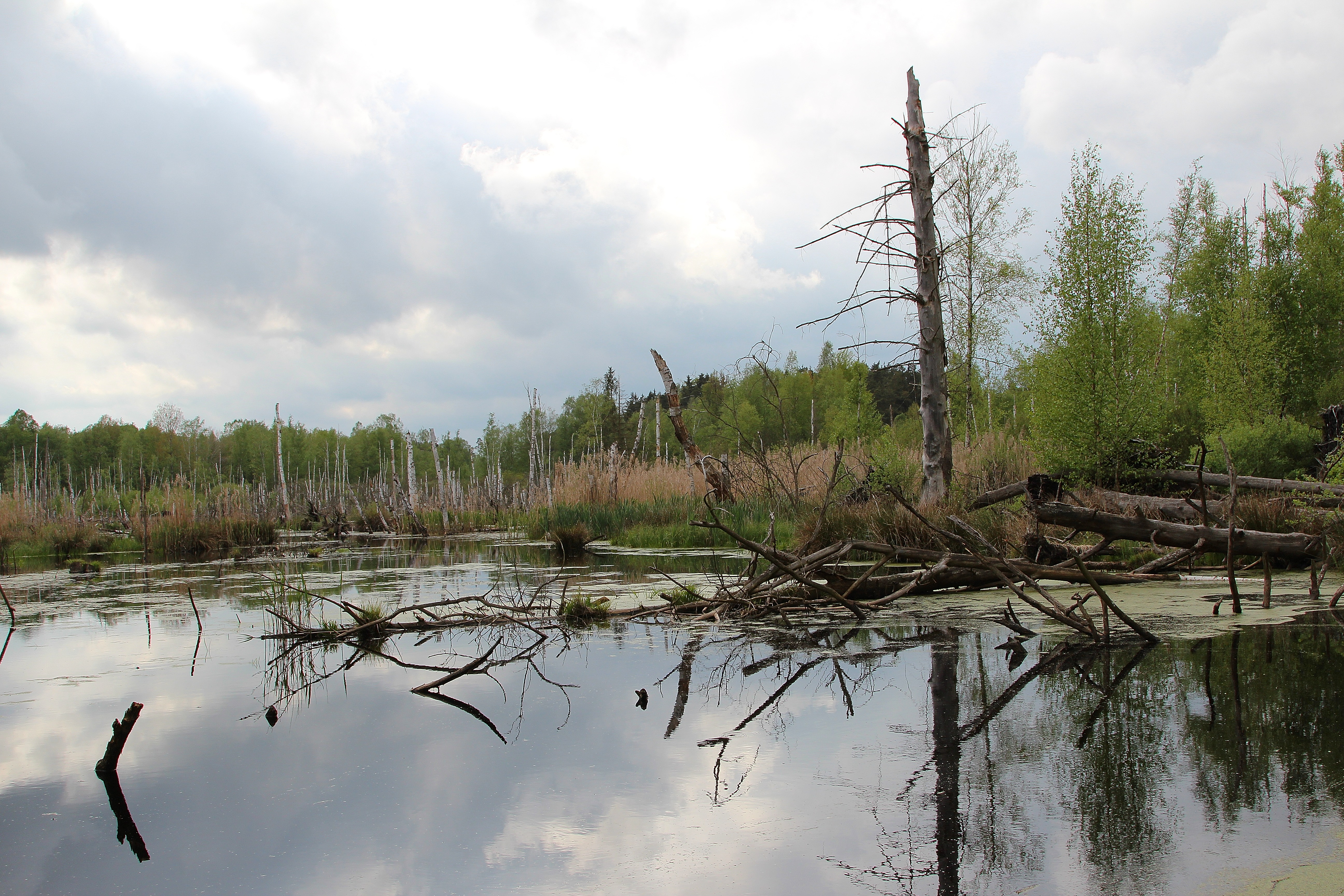 Das Prackendorfer und Kulzer Moos im Landkreis Schwandorf (Oberpfalz, Bayern) umfasst eine Gesamtfläche von etwa 80 Hektar. Es handelt sich um eine der wenigen teilweise noch intakten Hochmoorflächen im nicht alpinen Raum Süddeutschlands. Über 100 vom Aussterben bedrohte Tier- und Pflanzenarten sind im Kulzer und Prackendorfer Moos zu finden. Ziel ist es, die hochmoortypischen Standortbedingungen zu erhalten und zu verbessern. Die Europäische Union und die Stiftung Bayerischer Naturschutzfonds fördern das Projekt finanziell. Weitere Beteiligte sind die Gemeinde Thanstein, die Gemeinde Dieterskirchen, die Direktion für ländliche Entwicklung Regensburg, das Wasserwirtschaftsamt Amberg, der Naturpark Oberpfälzer Wald, der Landschaftspflegeverband Schwandorf, das Landratsamt Schwandorf, die Regierung der Oberpfalz und das Bayerische Staatsministerium für Landesentwicklung und Umweltfragen.